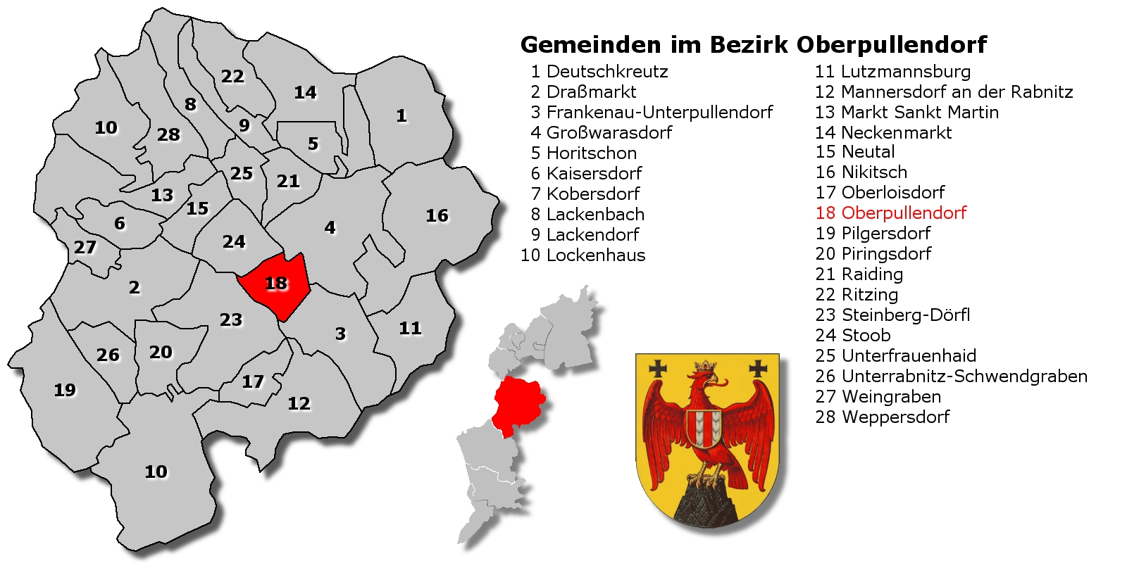 Gemeindekarte Bezirk Oberpullendorf (Burgenland, Österreich)